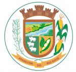 Brasão do Município de Aparecida do Rio Doce/GO